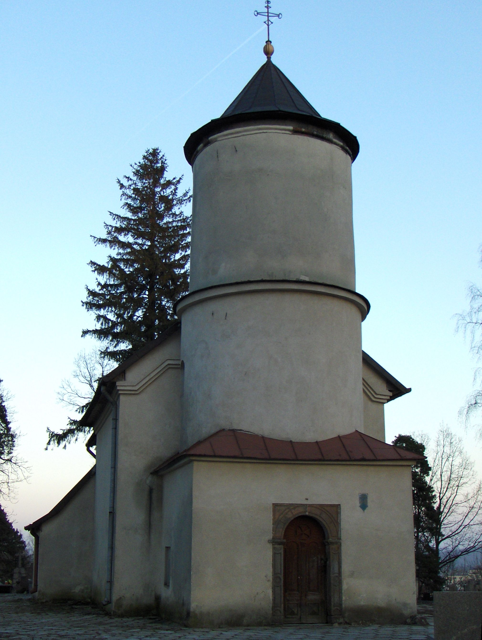 Małogoszcz - kościół cmentarny (z 1595 r.) obecnie filialny p.w. św. Stanisława 113 from 11.02.1967.